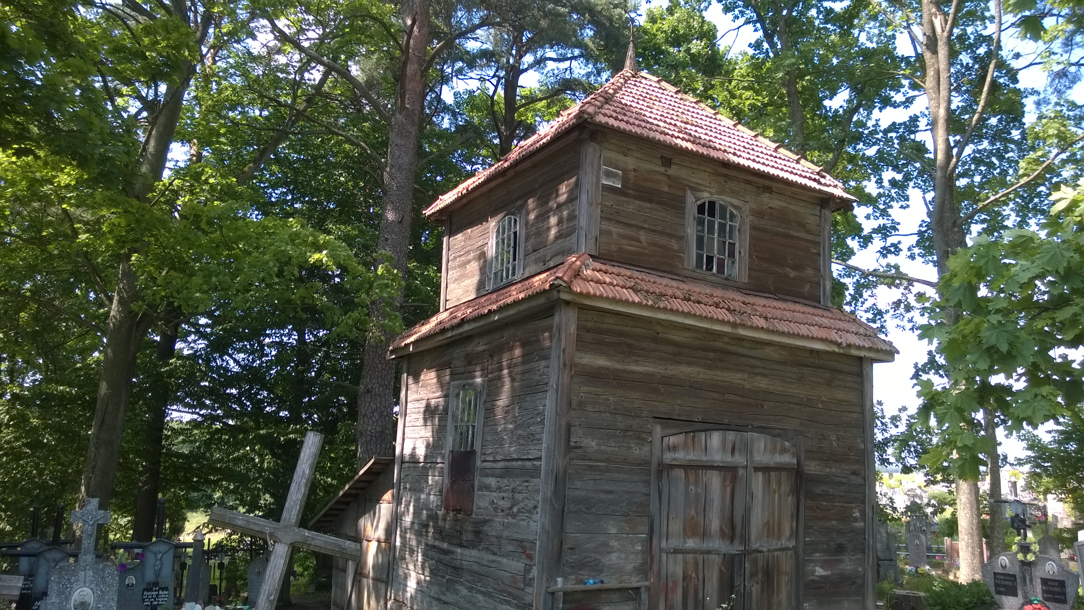 Bielahruda, Belarus